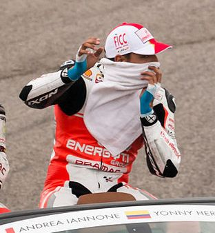 Yonny Hernandez 2014